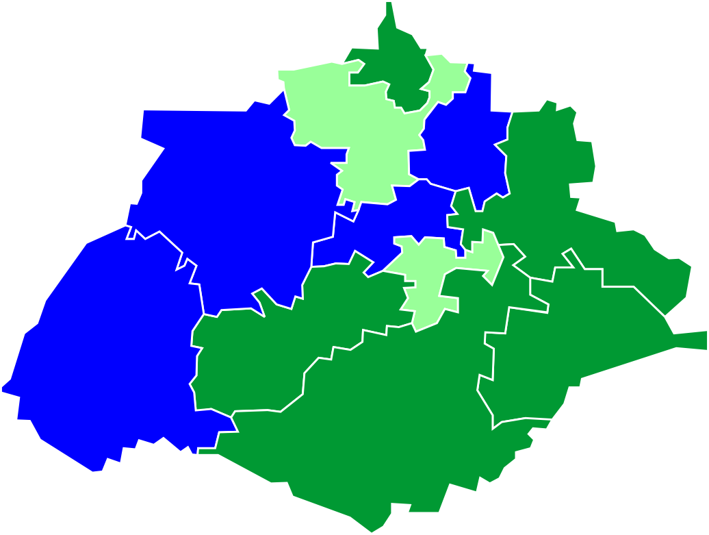 Resultados de la elección a Ayuntamientos por partido político en el estado de Aguascalientes, México en 2007.